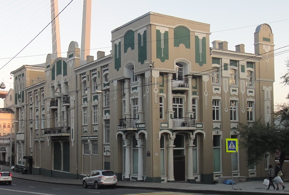 улица Светланская, д. 50